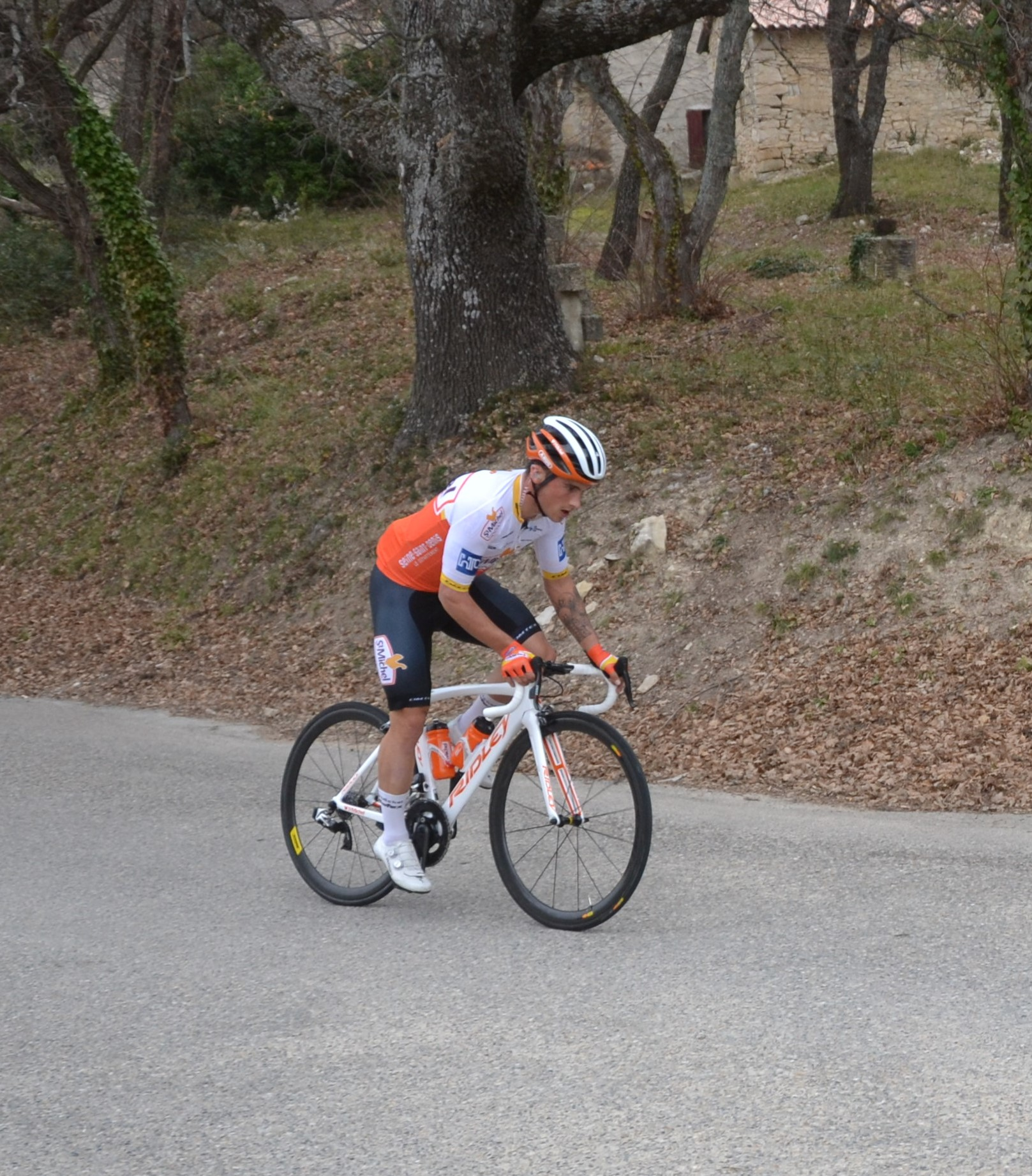 durant la 4ème étape du Tour de la Provence